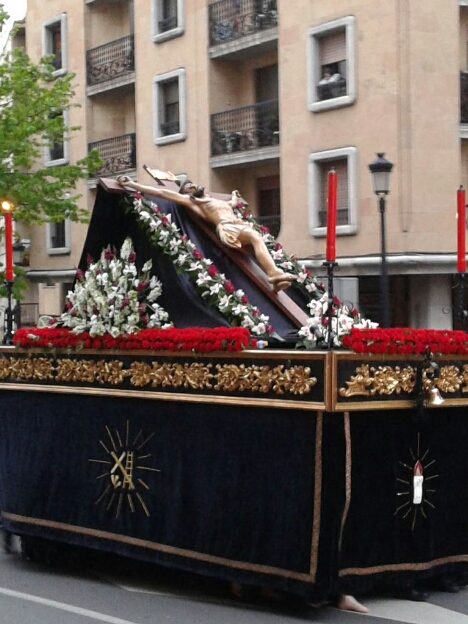 Salamanca. Cristo de la Vela. Hermandad del Silencio. Sábado Santo 2014